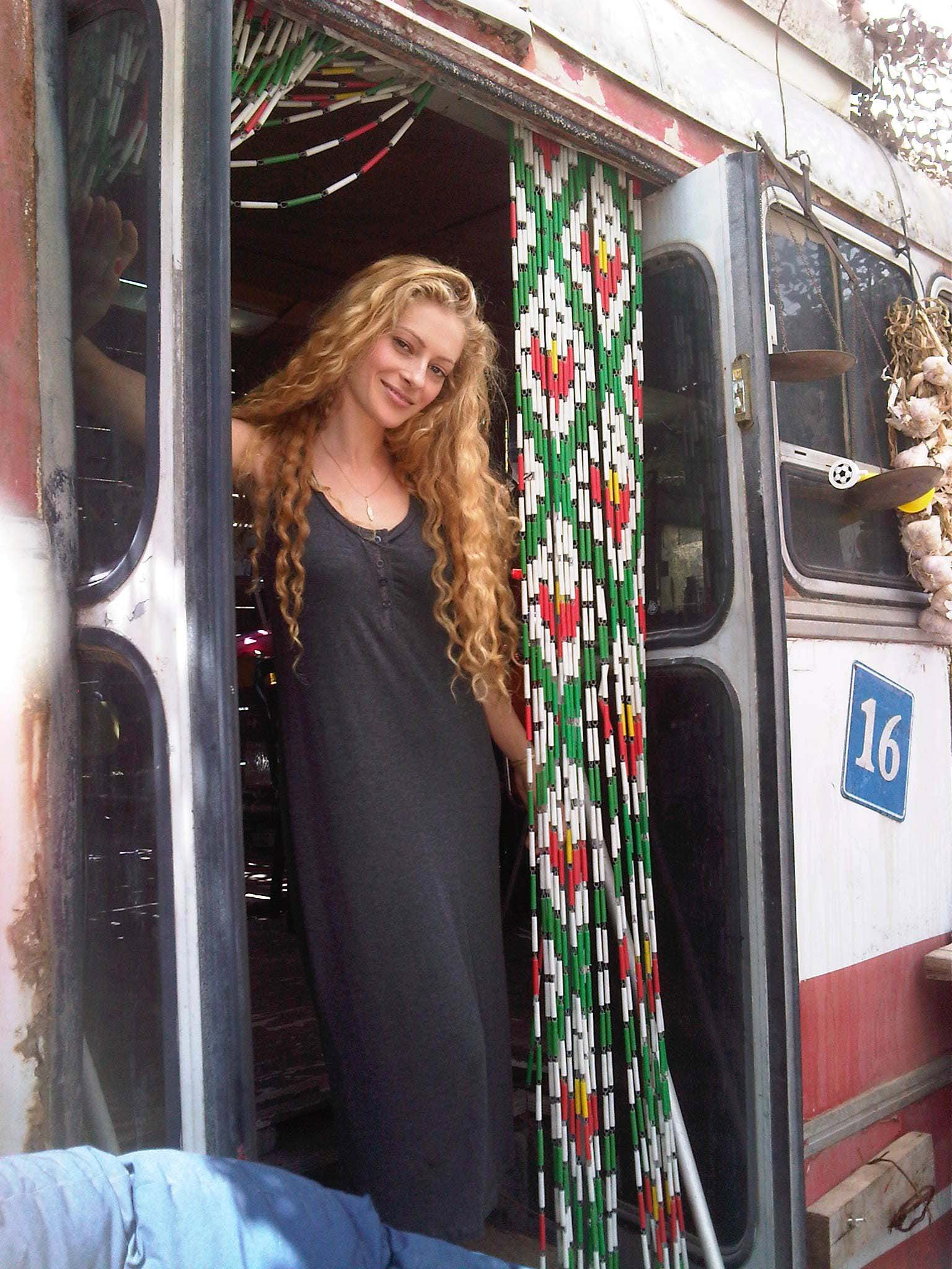 אפרת דור על הסט של עספור 2